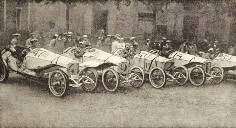 L'équipe Mercedes au Grand Prix de Lyon en 1914 (La Vie au Grand Air du 11 juillet 1914, p.613)